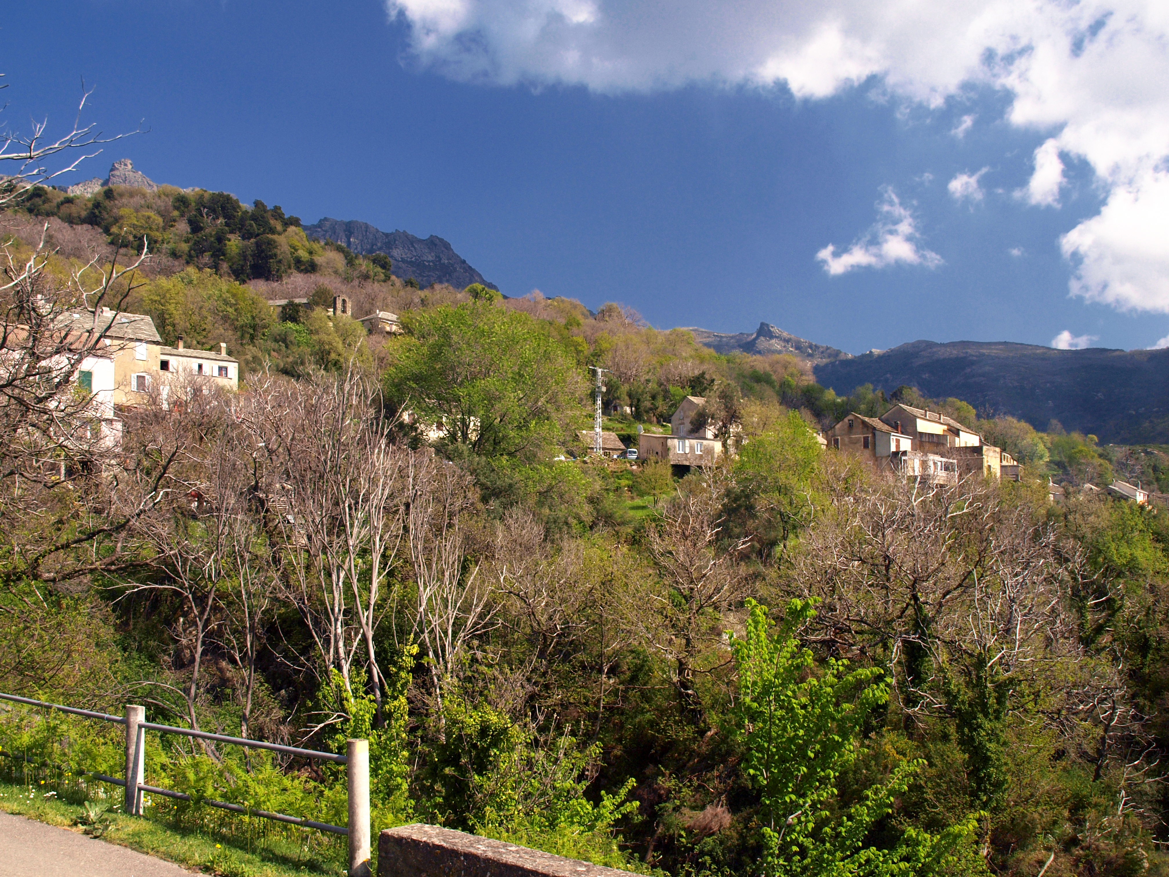 Olcani (Corsica) - Hameau Ferragini